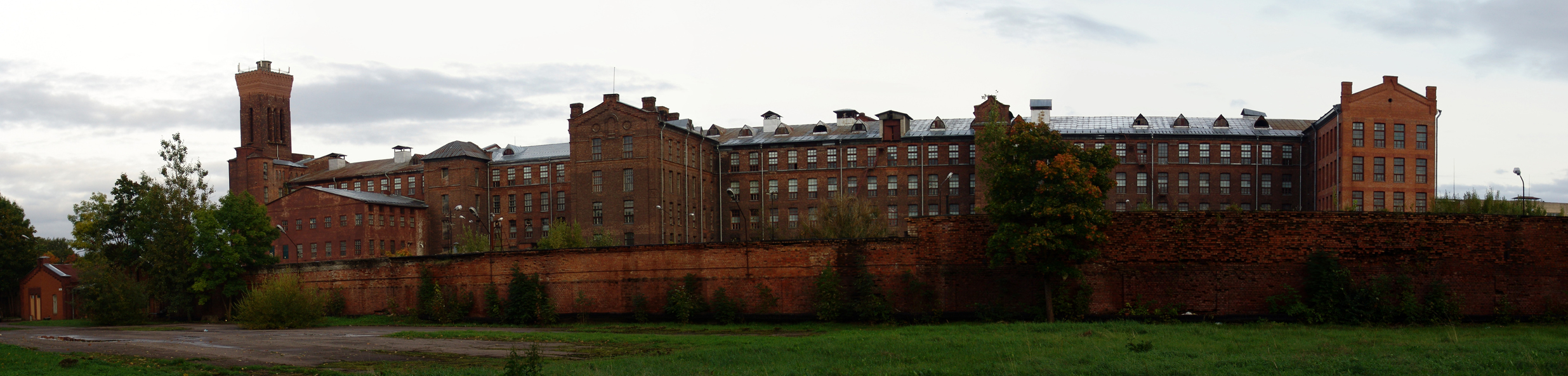 Kreenholmi Joala vabriku hoone